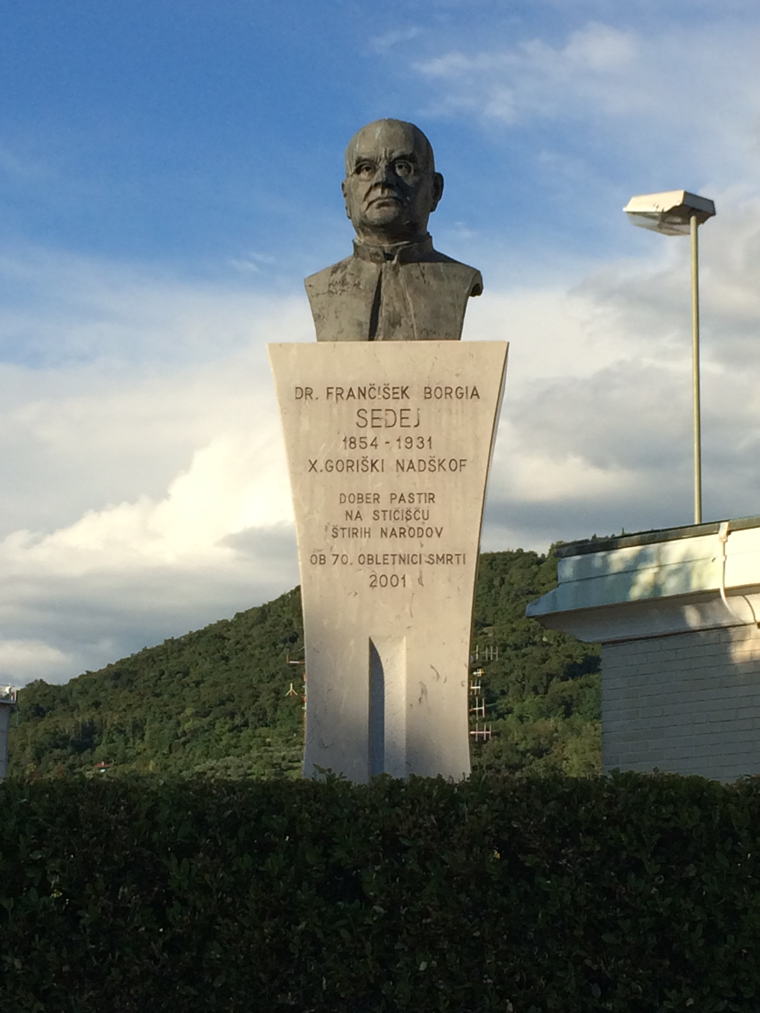 Busto del vescovo Francesco Borgia Sedej - Nova Gorica